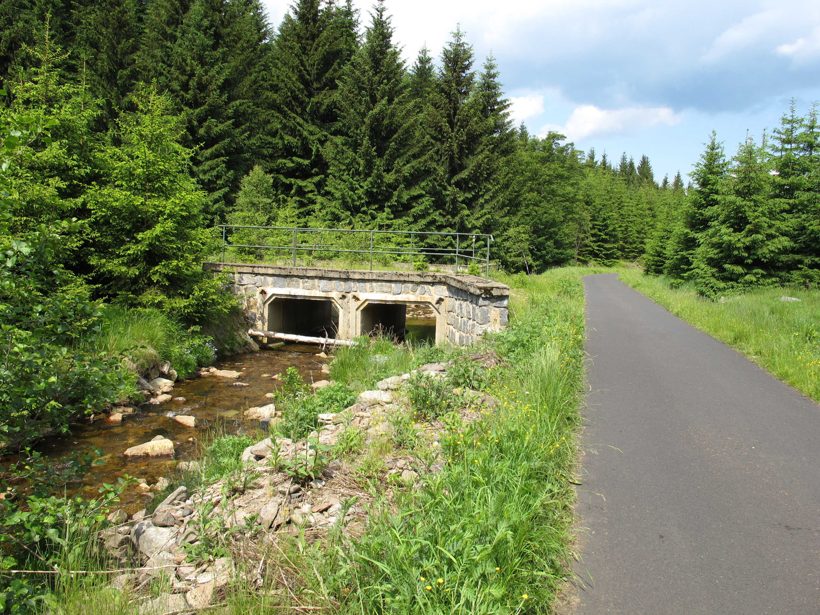 Telčský potok v Krušných horách